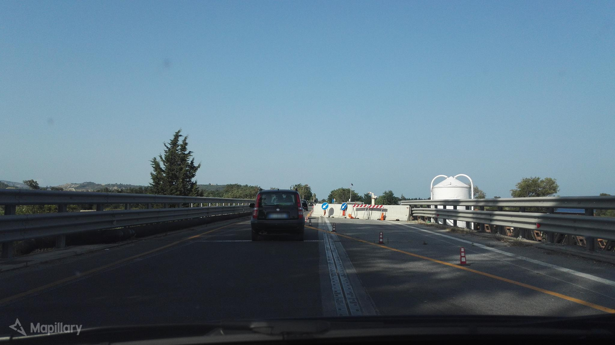 Ponte sull'Allaro agosto 2017 con alle spalle Caulonia con il senso alternato di marcia sul ponte definito "repubblciano" a seguito del crollo dovuto all'alluvione del 2015.